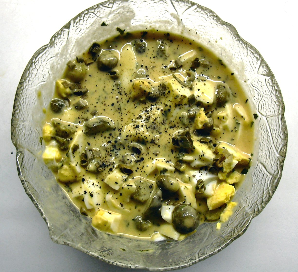 adhoc sauce gribiche